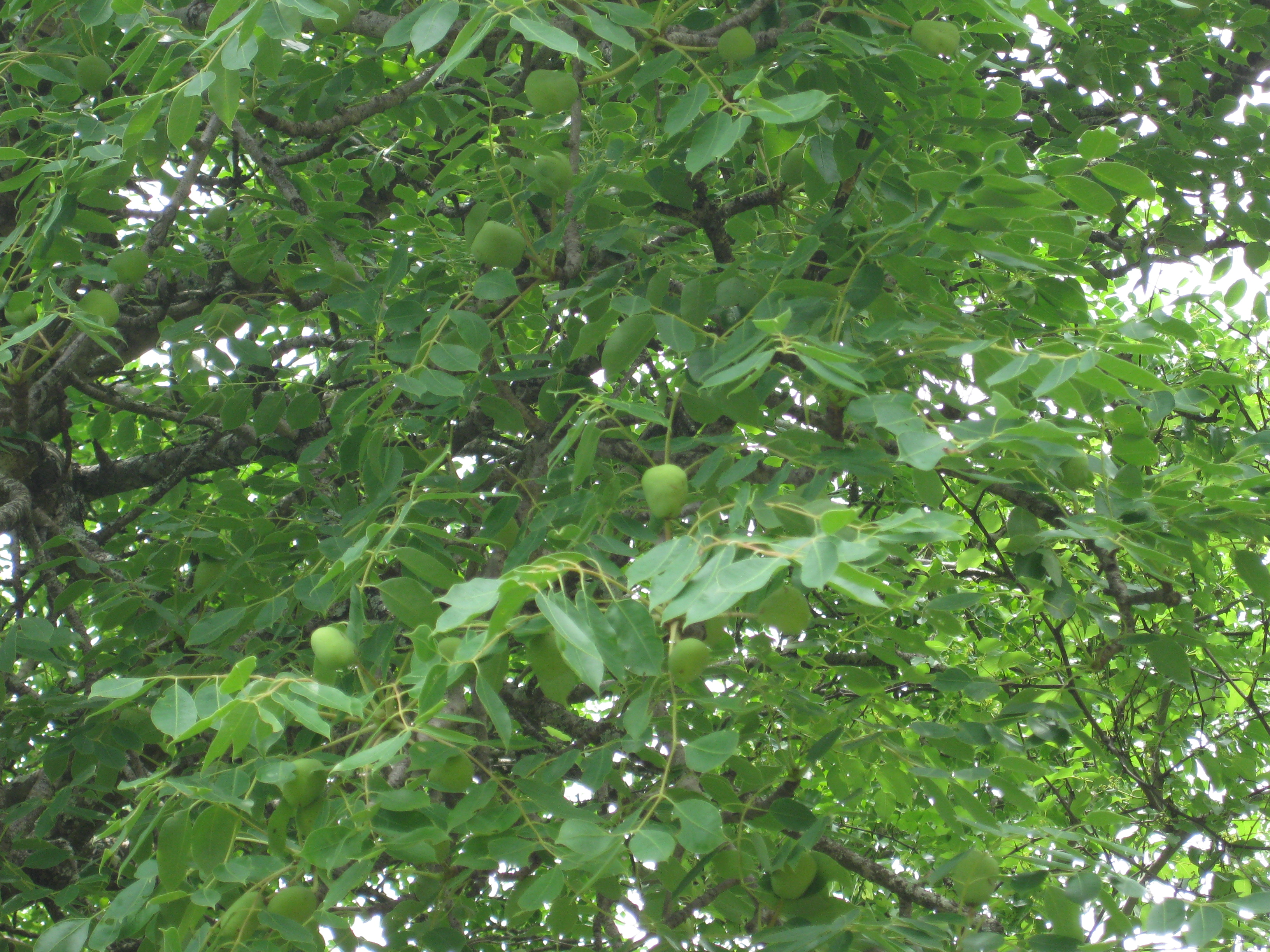 Unripe marula fruit